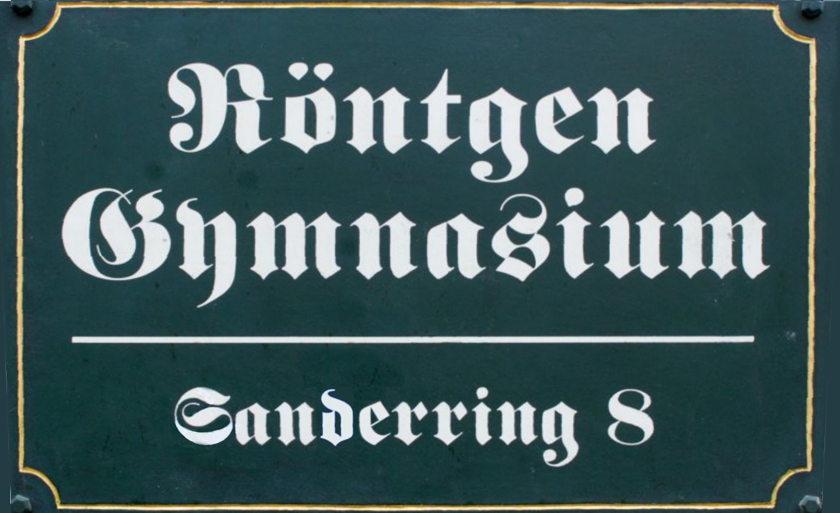 Schild am Haupteingang des Röntgen-Gymnasium Würzburg